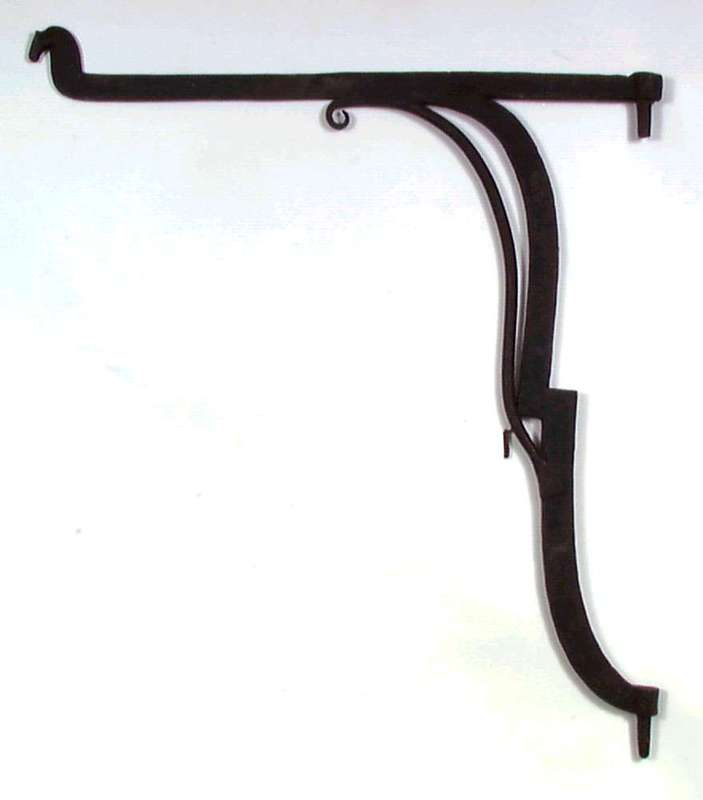 Skjerding av smijern fra Kviteseid i Telemark. Foto Norsk Folkemuseum, NF.1928-0444.